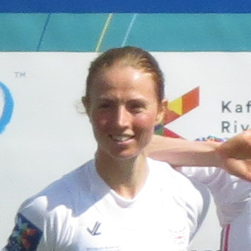 Podium LW4x GER : THOMA, Katrin PIEPER, Leonie MUELLER, Lena NOSKE, Anja GBR STUBBS, Brianna WALCZAK, Ruth CRAIG, Emily PIGGOTT, Eleanor NED SCHONK, Anne Marie KRAAIJKAMP, Mirte WOERNER, Elisabeth FRENKEN, Marie-Anne